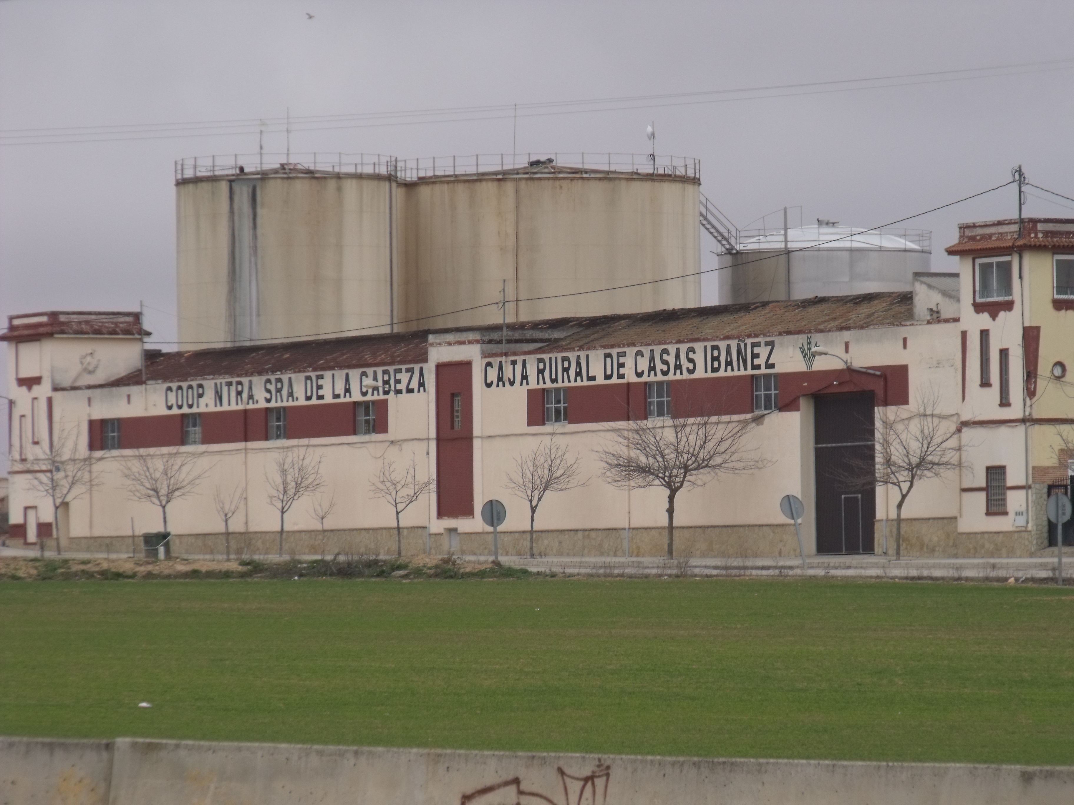 Exterior de la cooperativa Nuestra Señora de la Cabeza